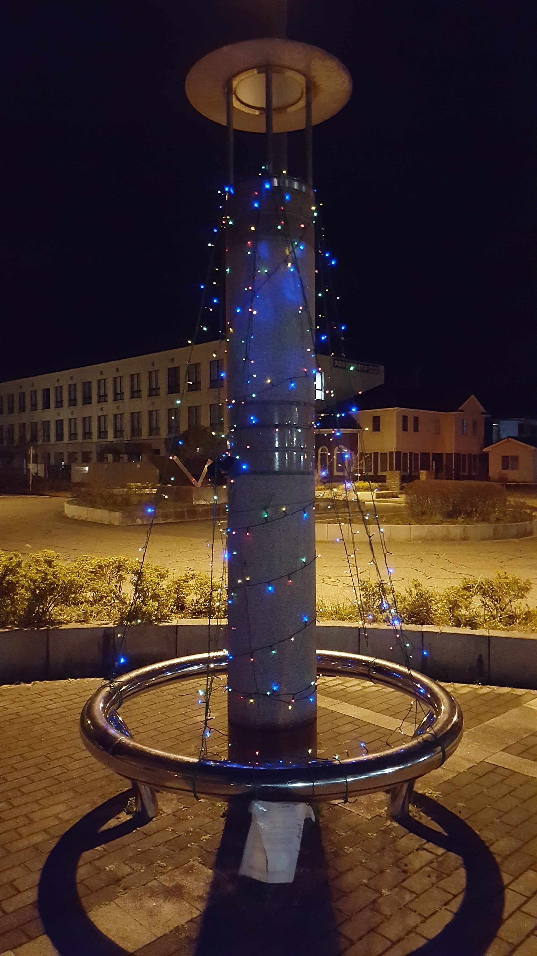 2018年12月に設置された越後赤塚駅前のクリスマスイルミネーション